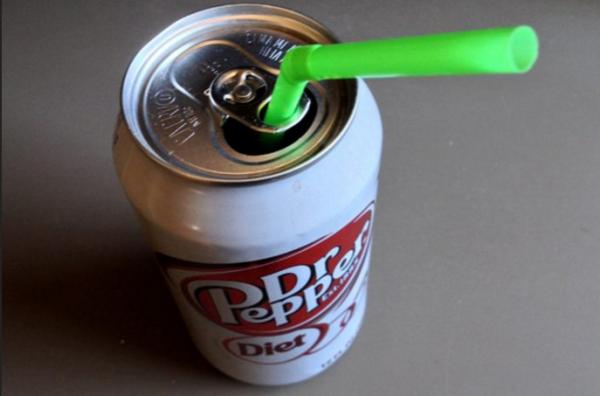 Paille maintenue par l'anneau rivé